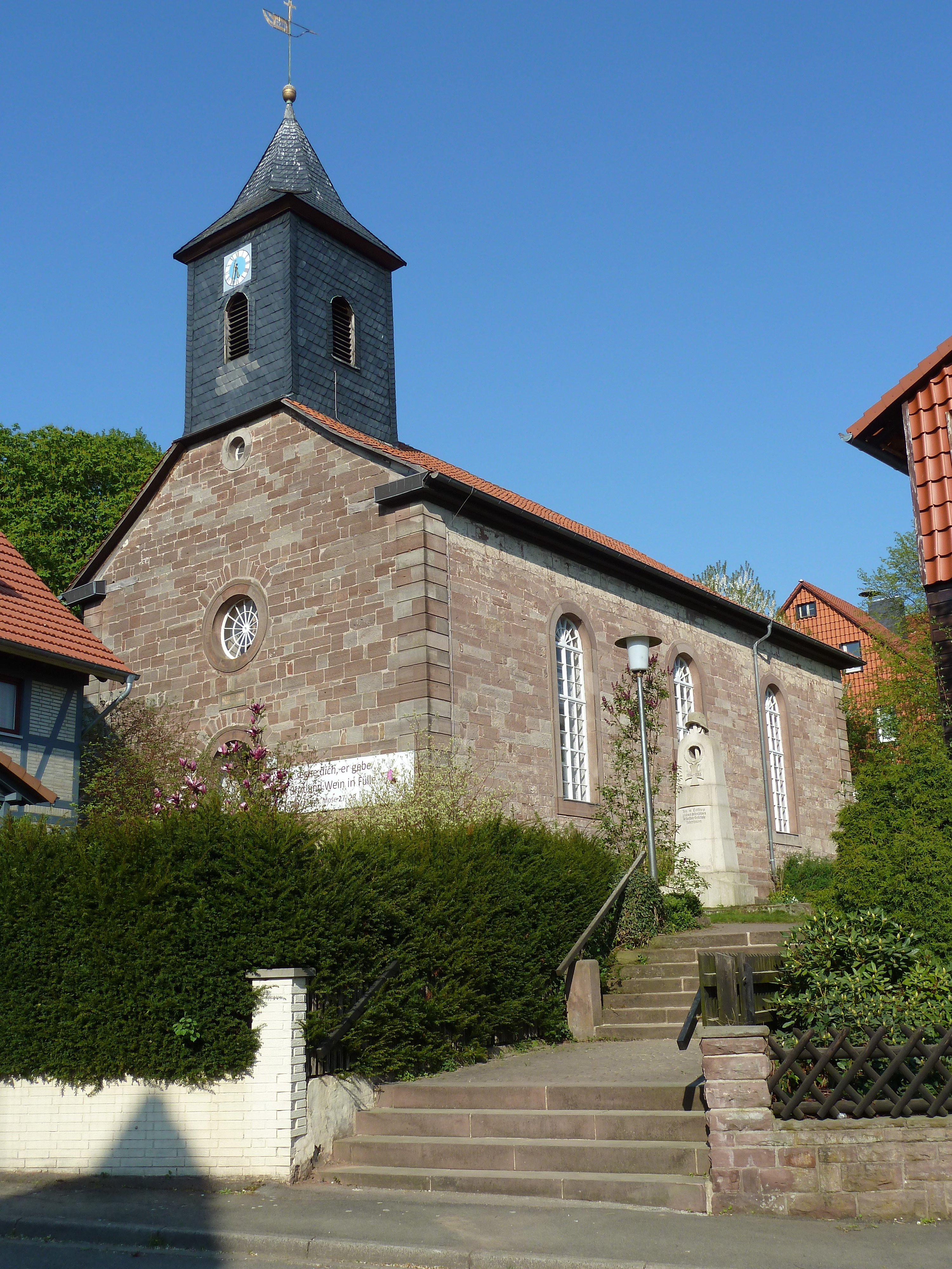 Ev.-luth. Kirche St. Johannis in Sudershausen, Flecken Nörten-Hardenberg, Landkreis Northeim. Erbaut 1852